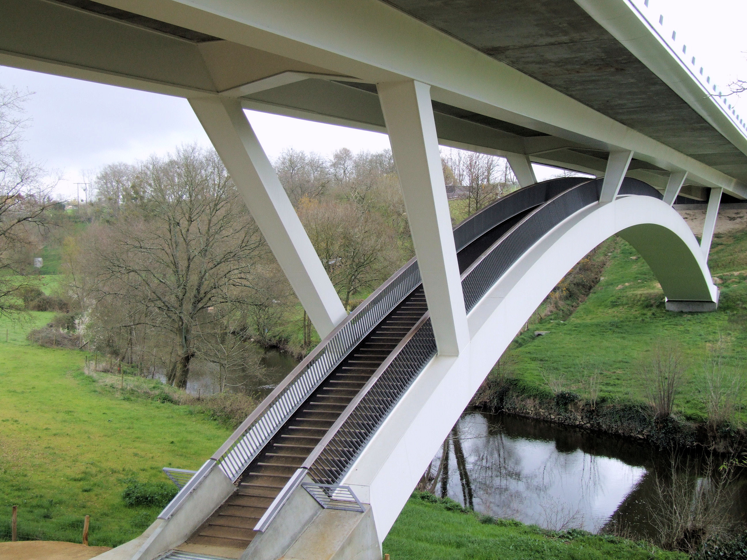 Viaduc sur la Moine - Contournement de Clisson